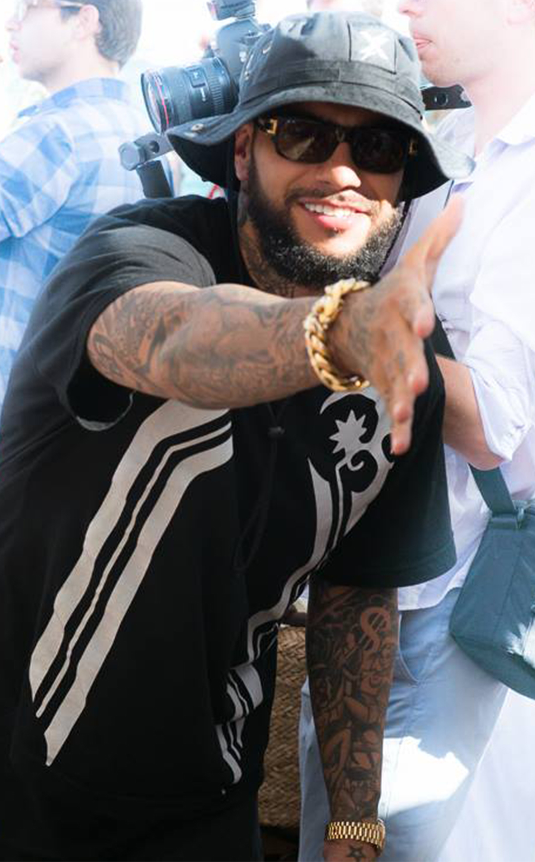 Timati à St Tropez photographie par Gil Zetbase